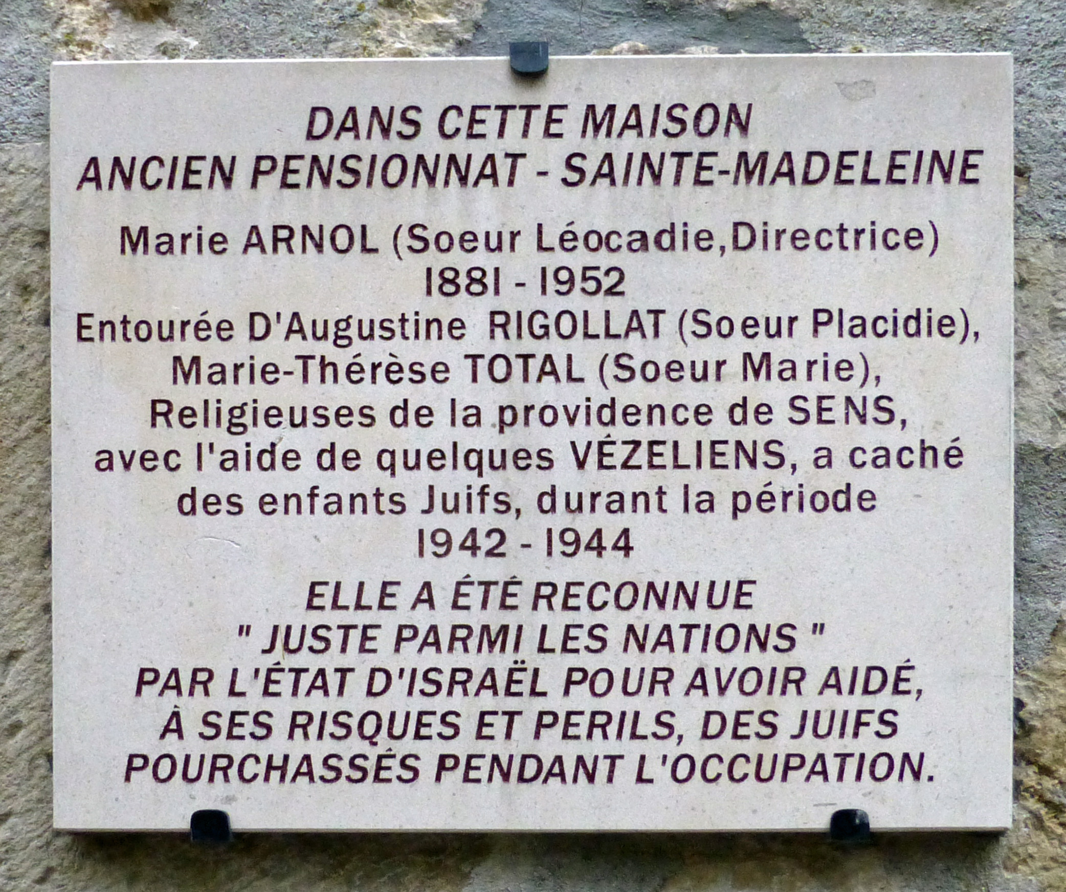 Vézelay (Yonne) : plaque commémorative pour Marie Arnol, Juste Parmi les Nations